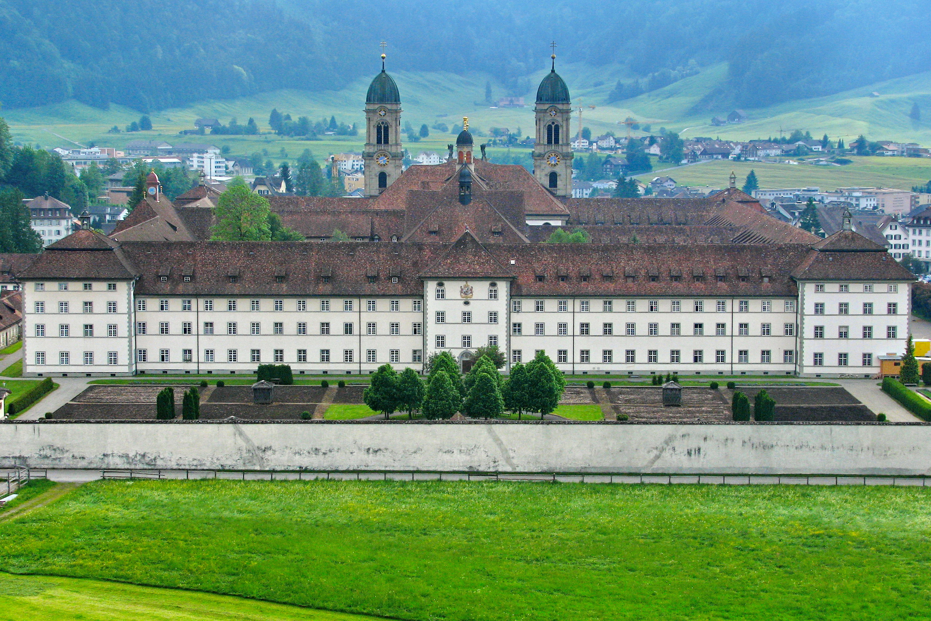 Benedictine Abbey in Einsiedeln (Switzerland)